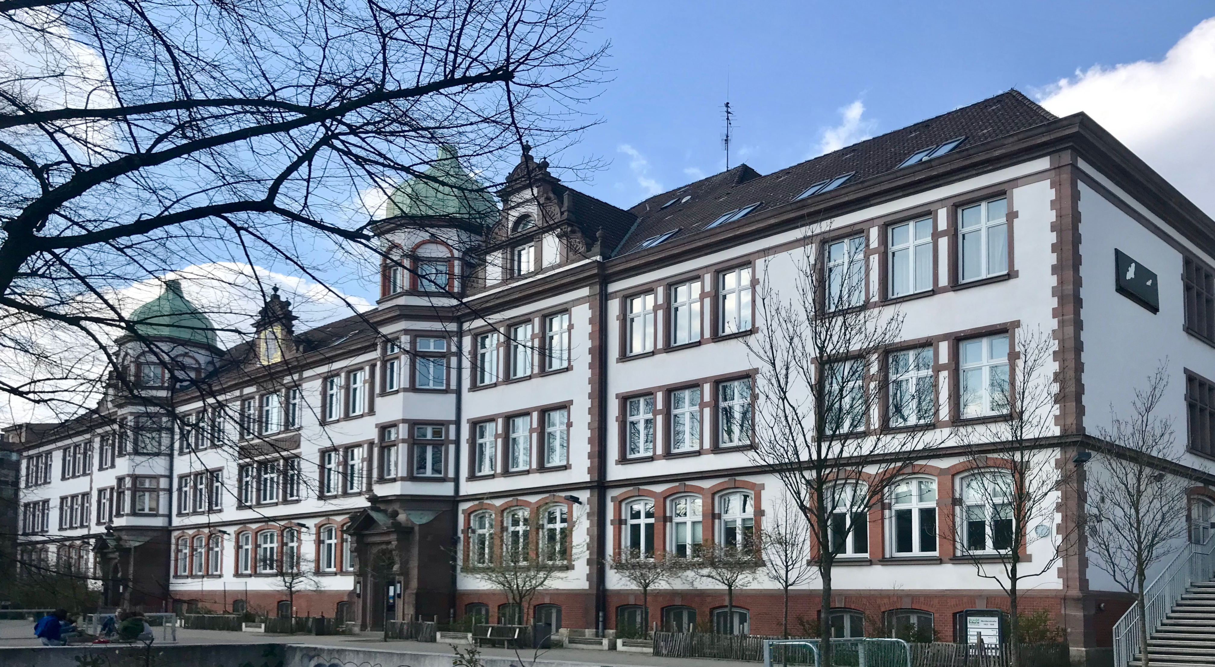 Brecht-Schule in Hamburg, Altbau